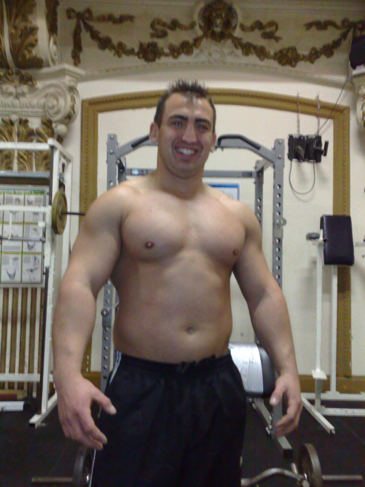 Andy Simmons